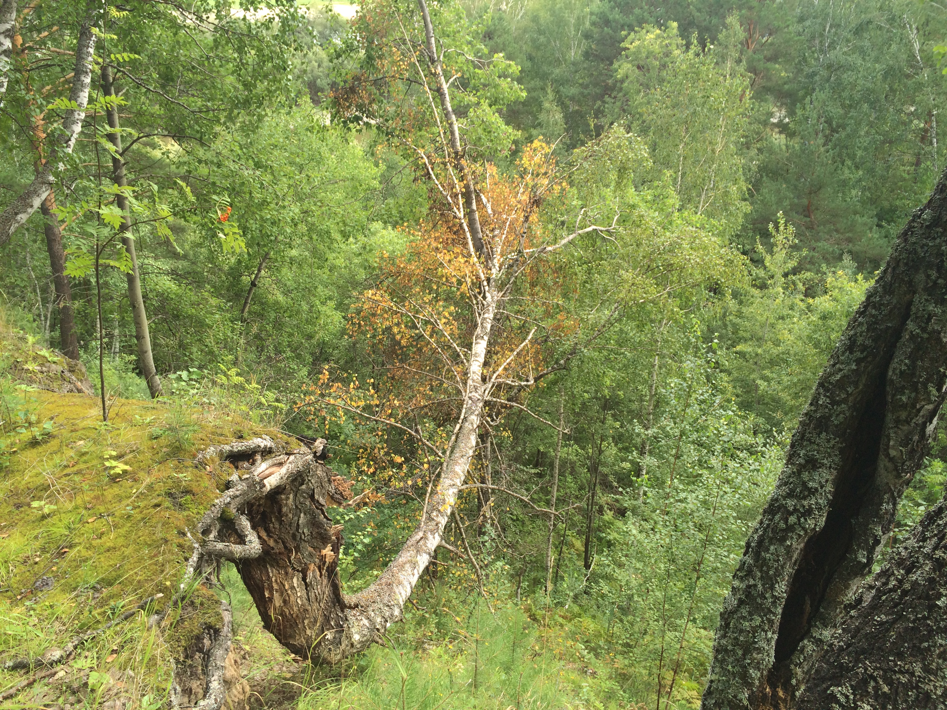 Яр, берег Оби у села Соколовка